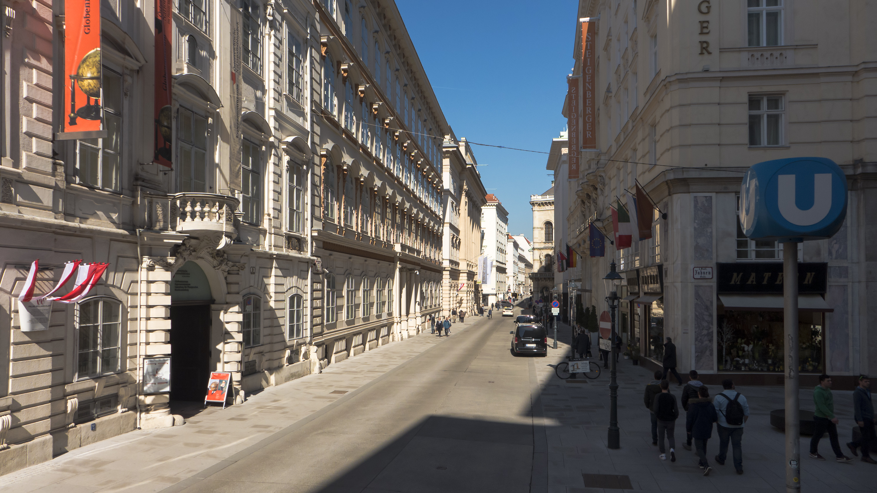 Herrengasse in Wien 1 bei der Fahnengasse Richtung Norden